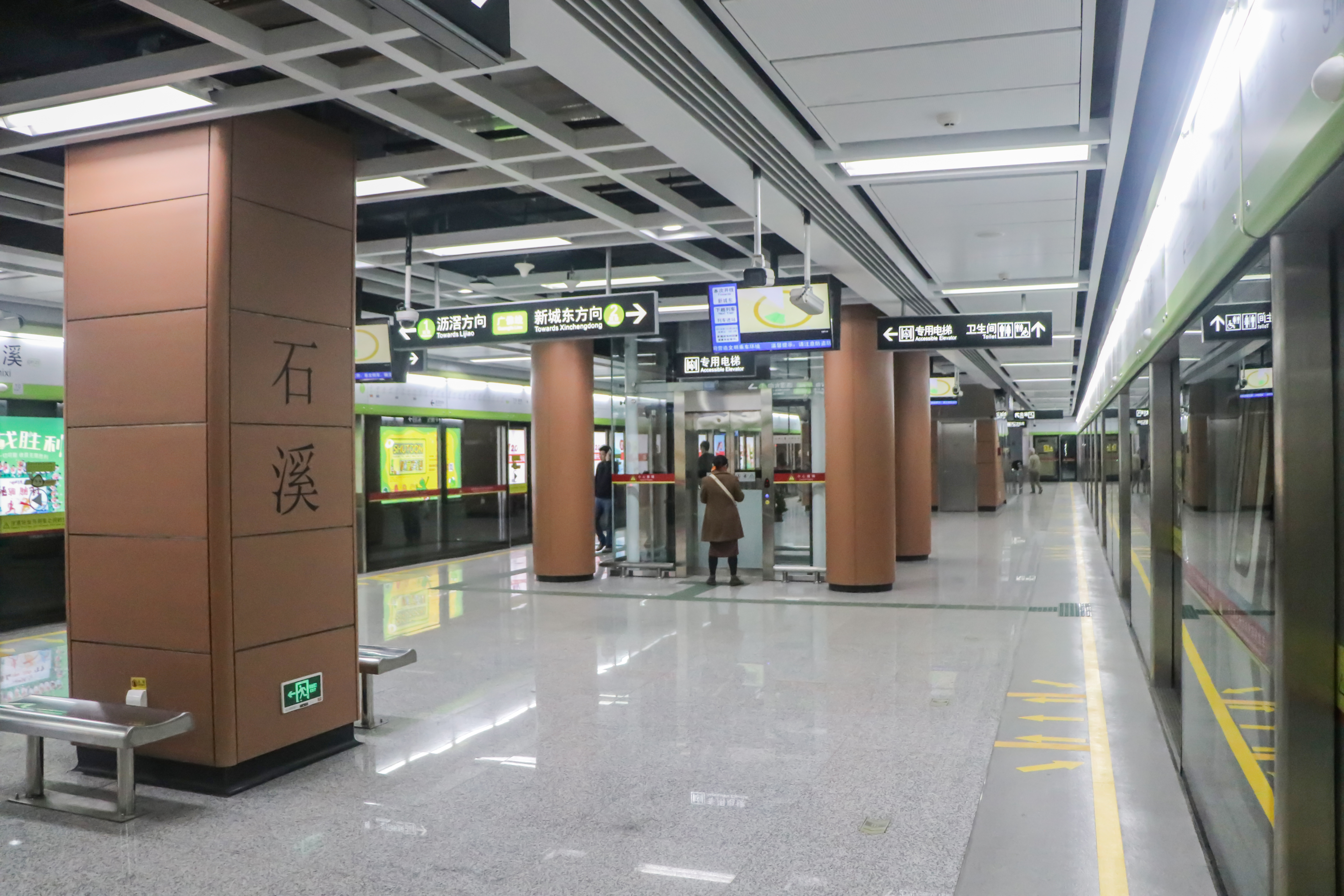 广州地铁石溪站